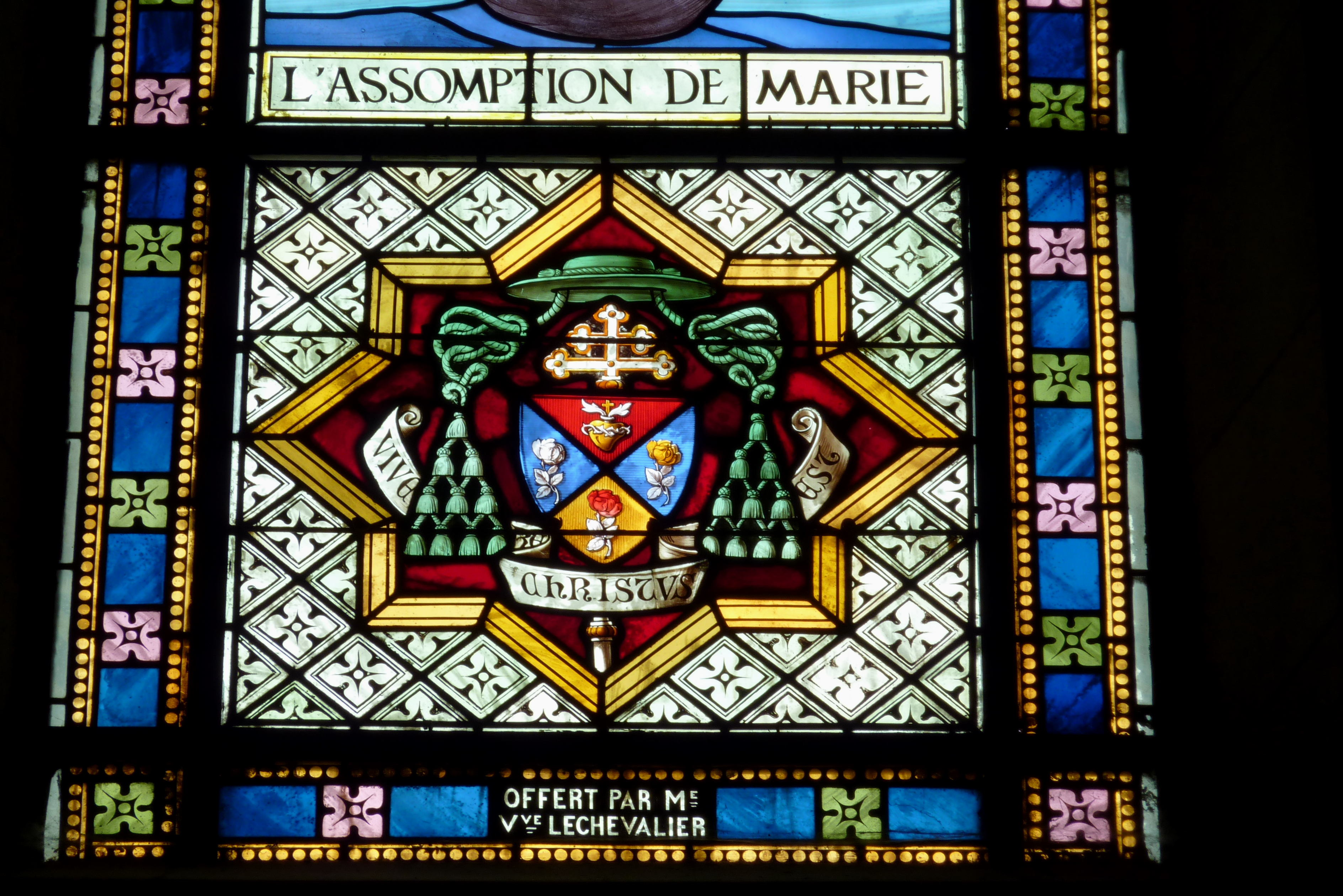 Bleiglasfenster (Ausschnitt) in der katholischen Pfarrkirche Cœur-Immaculé-de-Marie in Suresnes, Darstellung: Wappen des Kardinals Léon-Adolphe Amette